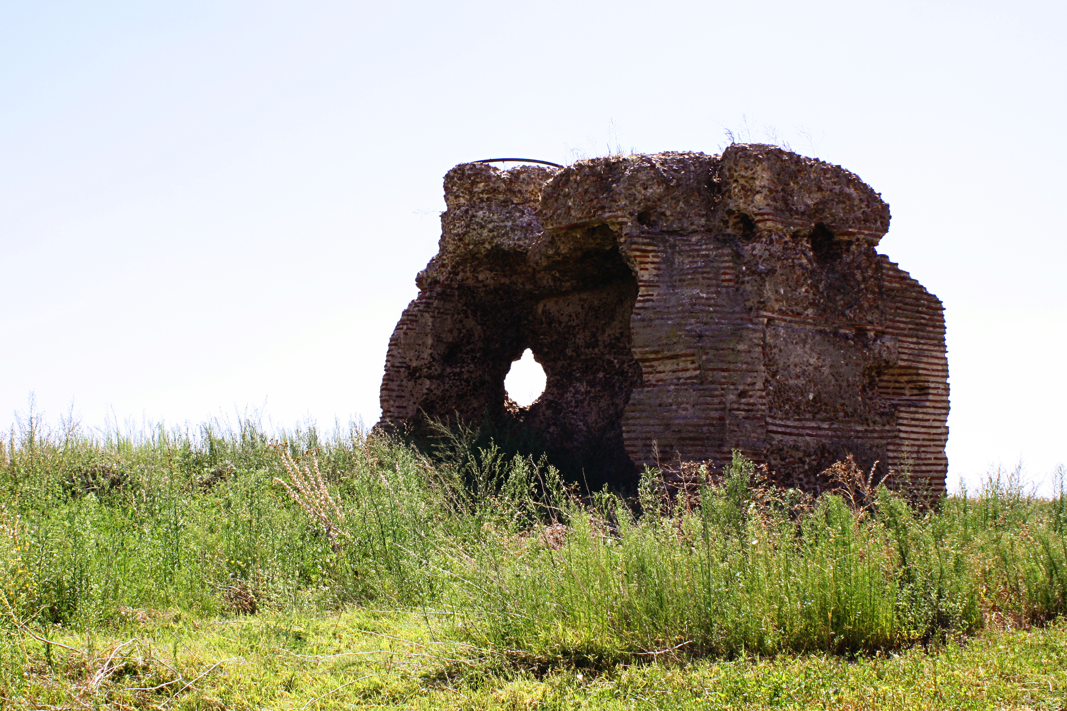 Vista delantera del Torreón por Jose Maria Rodriguez Martin, "Chefo"